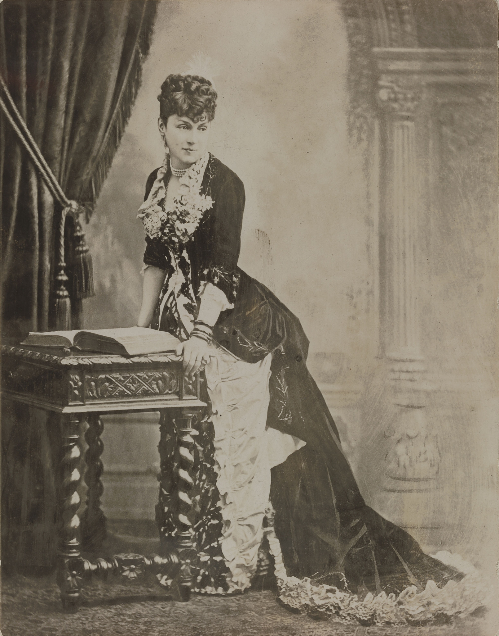 portrait de Marie-Louise Arconati-Visconti, peint en 1872.